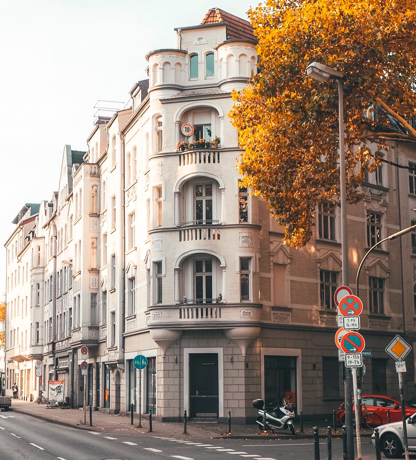 Schüchtermanncarree Dortmund Nordstadt